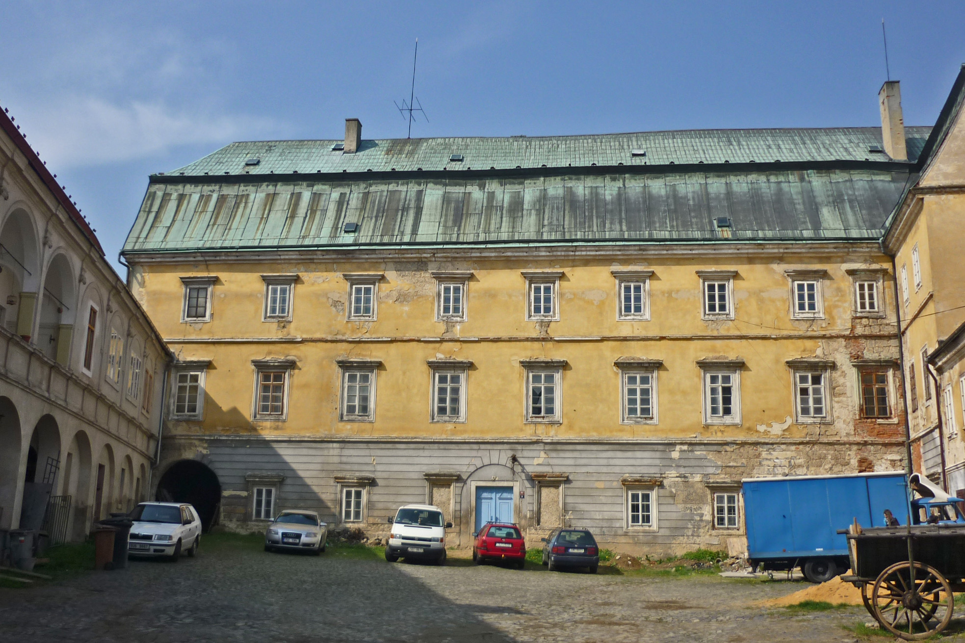 Schloss in Böhmisch Kamnitz (Česká Kamenice ) - Innenhof